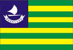 Bandeira do município de Paracuru, estado do Ceará, Brasil.